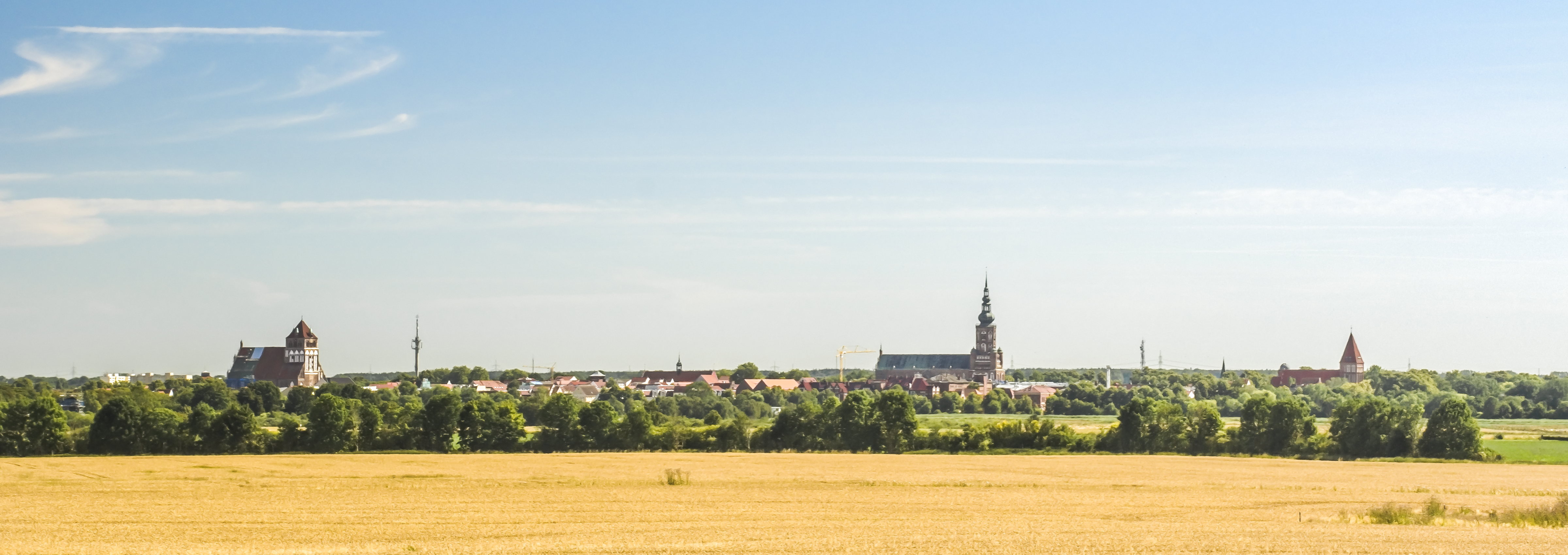 Blick auf Greifswald von der B105, nahe dem Caspar-David-Friedrich-Blick